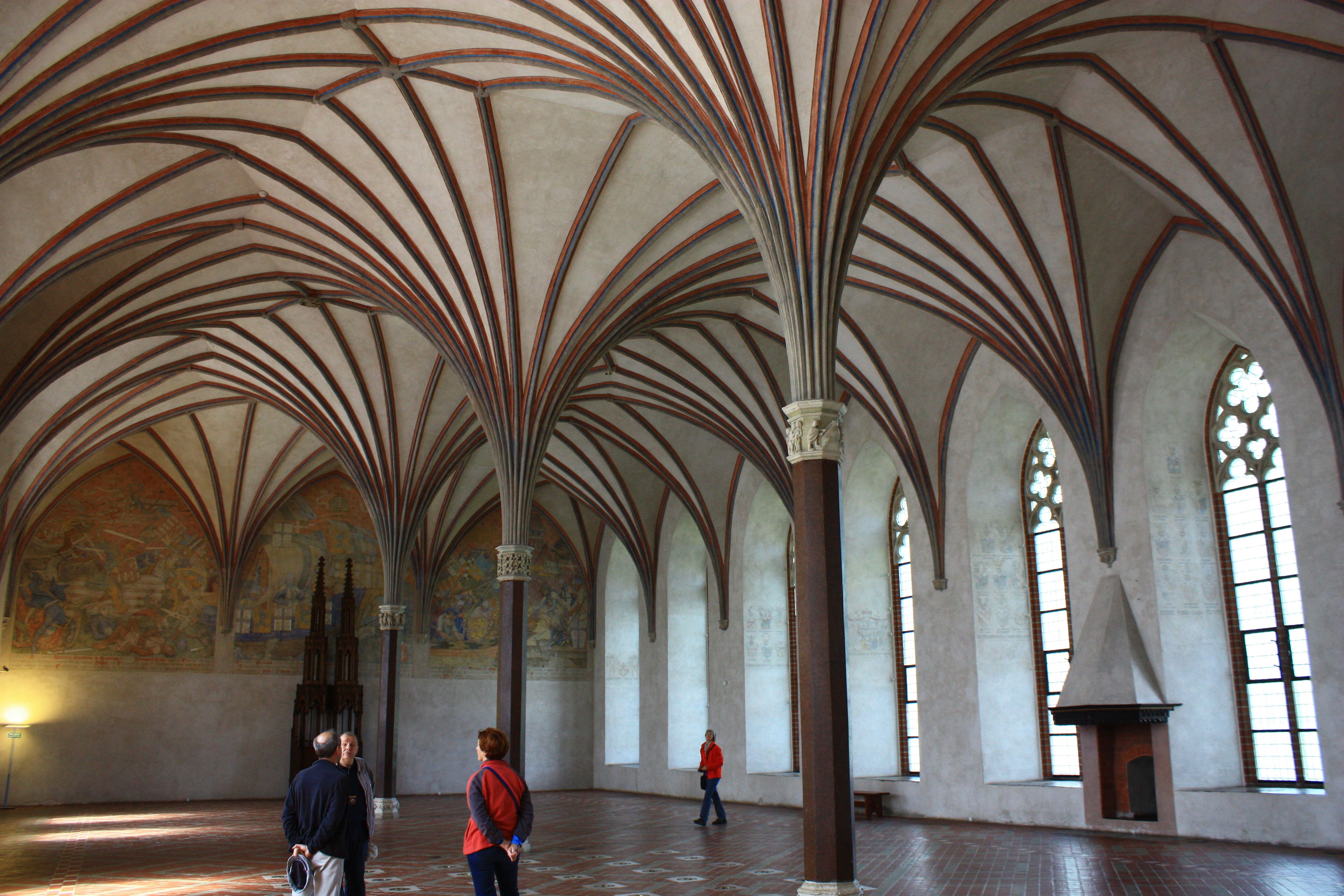 Malbork, zespół zamku krzyżackiego, XIII, XIX